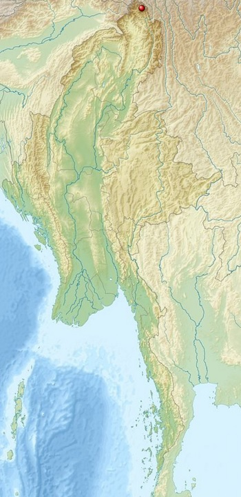 Stabila ekranbildo de la mapo montranta la situon de nacia parko Hkakabo-razi en Birmo, el enwiki